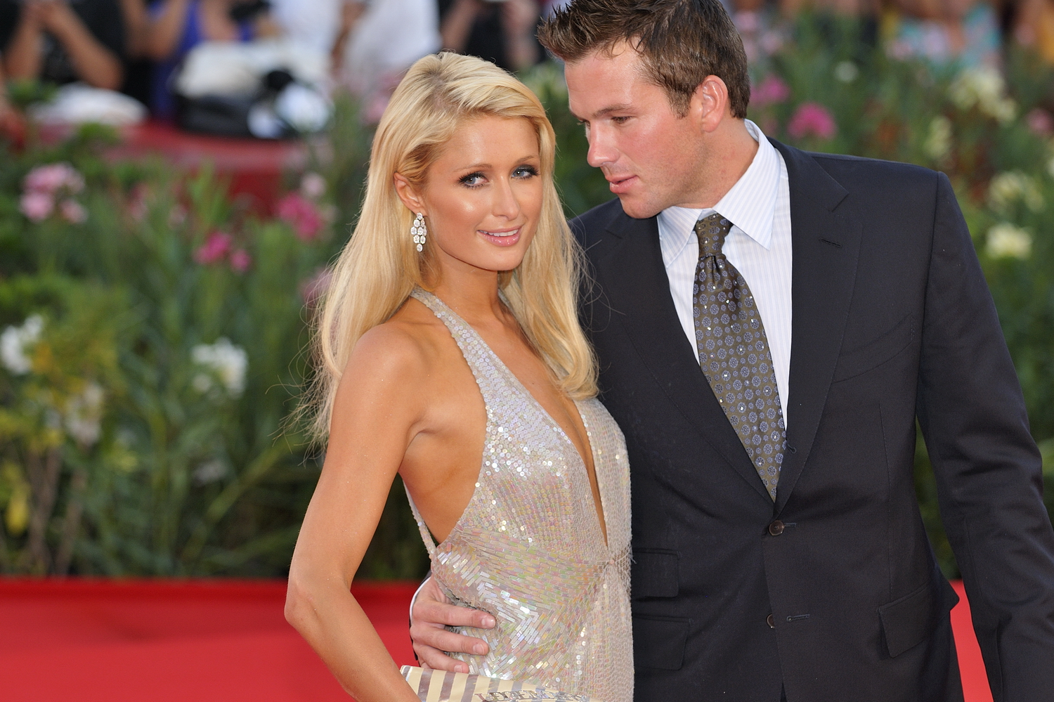 66ème Festival du Cinéma de Venise (Mostra), 3ème jour (04/09/2009) Paris Hilton et Doug Reinhardt lors du Tapis Rouge avec Nicolas Cage, Eva Mendes et le réalisateur Werner Herzog pour le film : Bad Lieutenant : Port of Call New Orleans